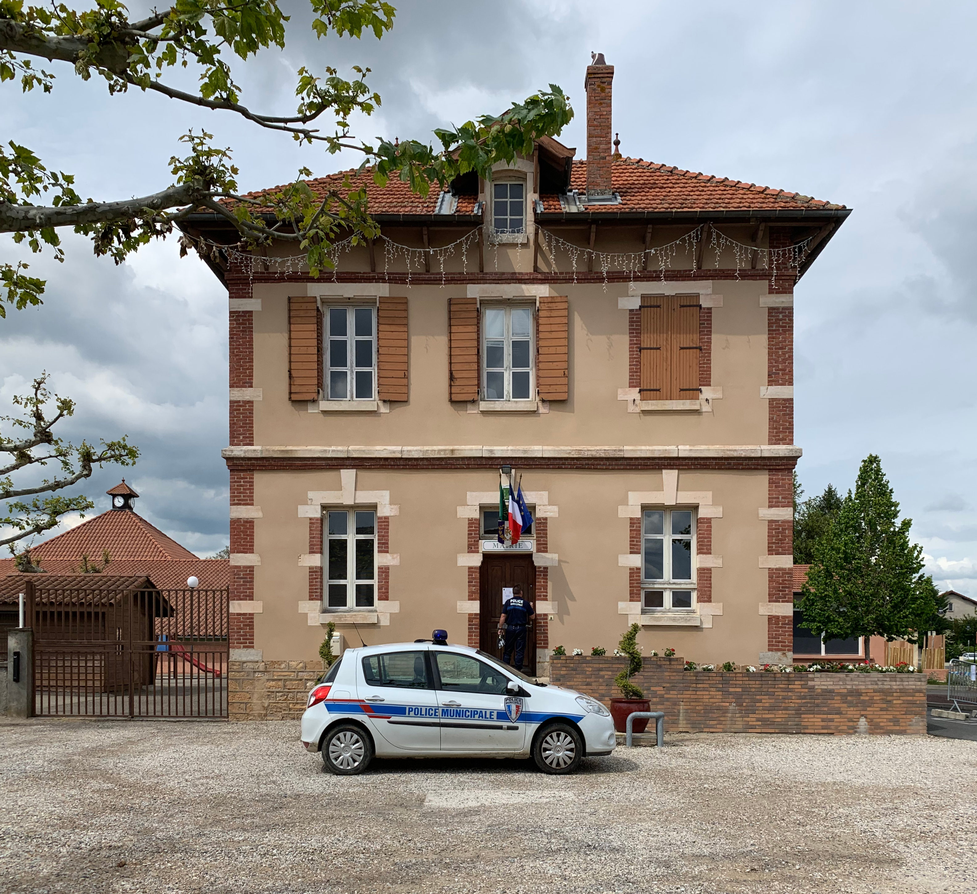 Mairie de Tramoyes (Ain, France) et véhicule de police municipale (mai 2019).